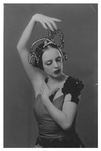 Люсия Нифонтова, финская балерина